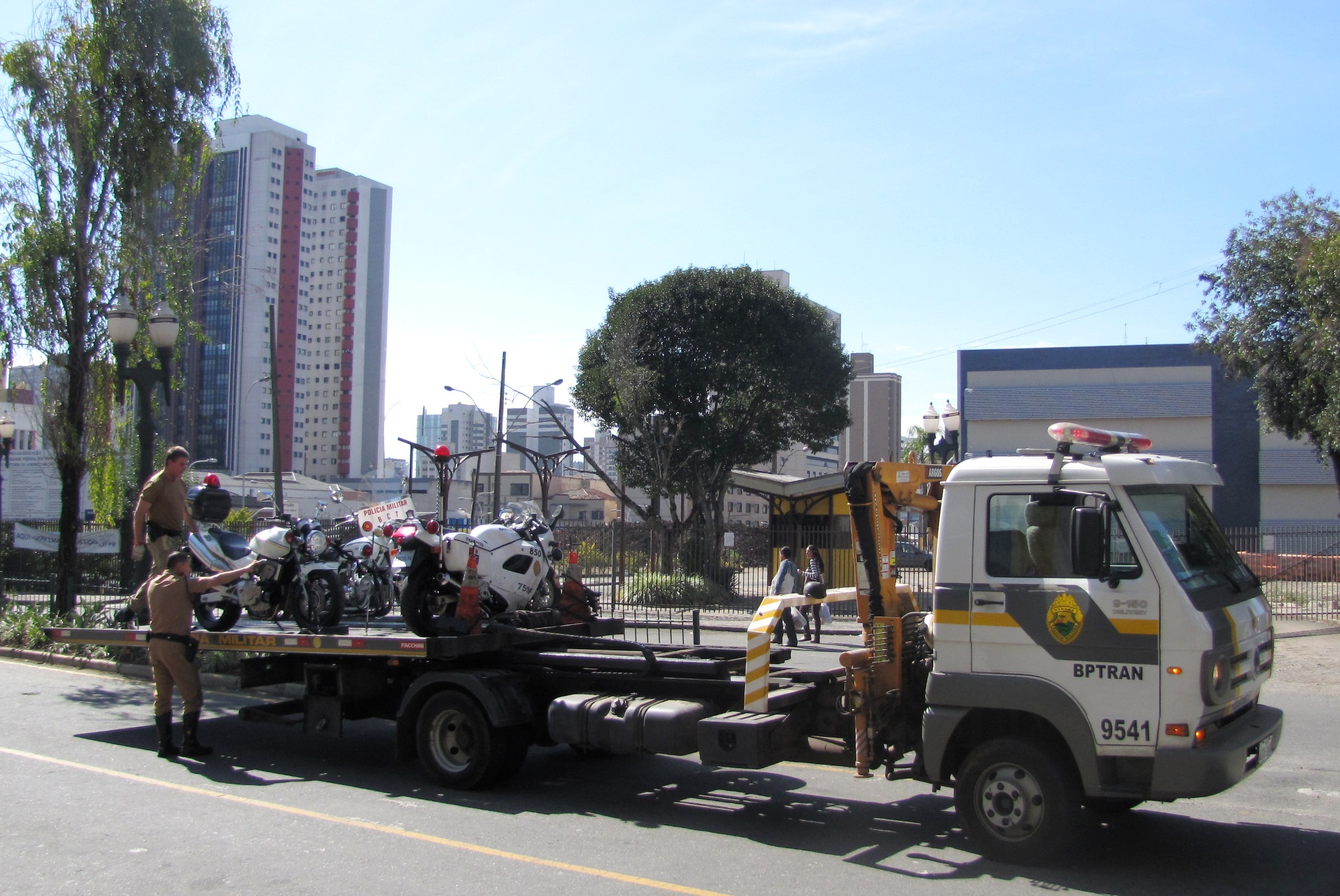 Guincho do Batalhão de Polícia de Trânsito da Polícia Militar do Paraná.